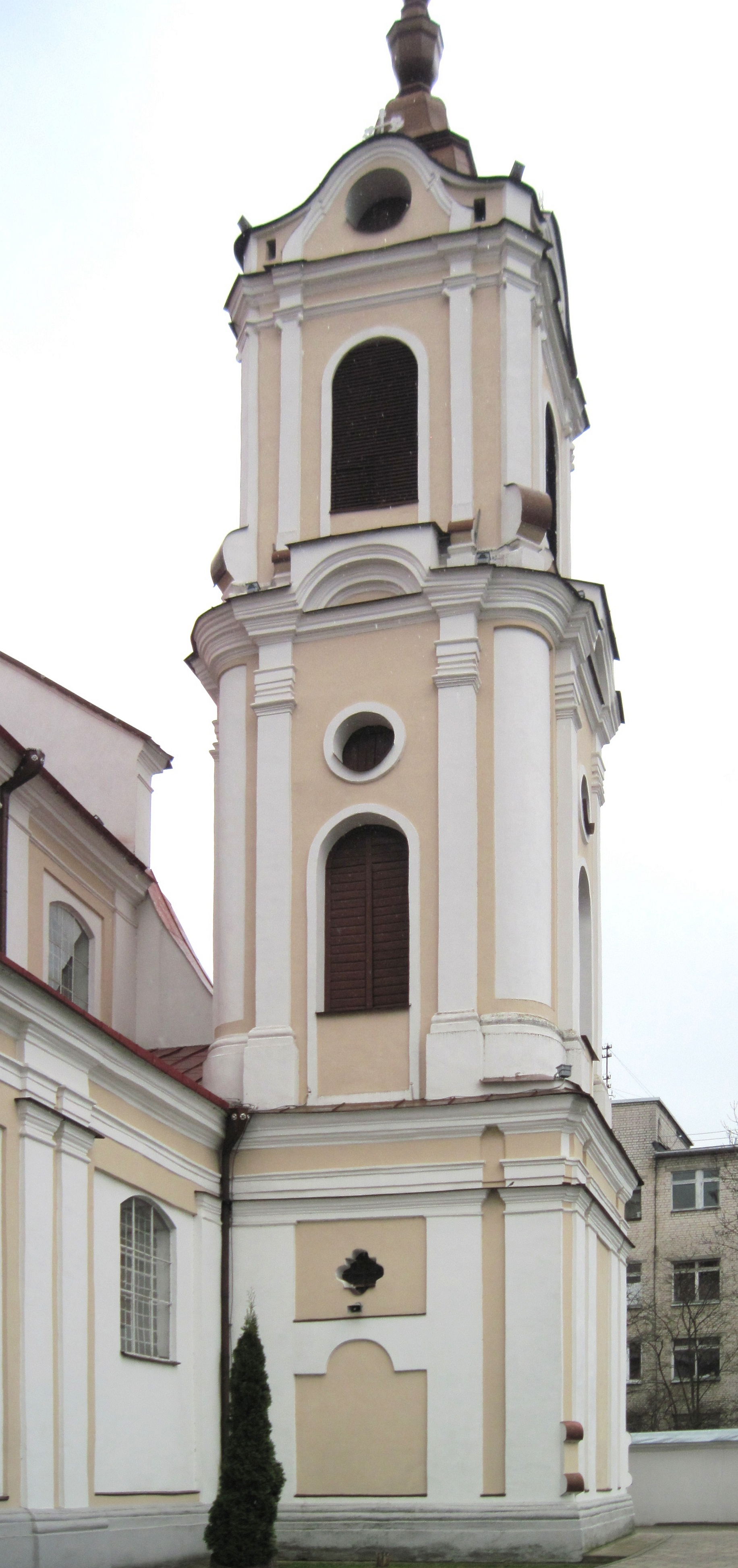 Беларуская (тарашкевіца): Вежа-званіца францысканскага кляштара ў Гродне